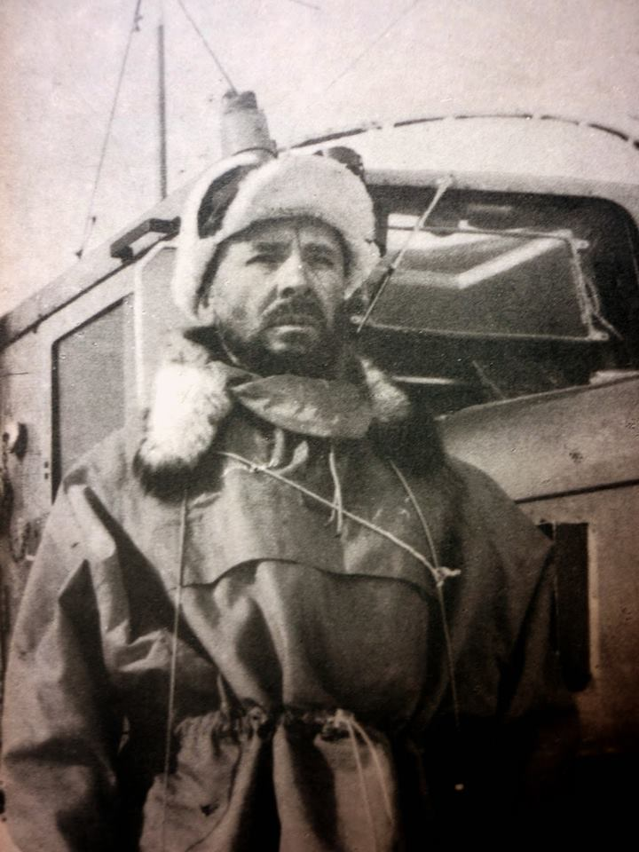 Coronel Jorge Leal, comandante de la primer expedición argentina en llegar al polo sur en el año 1965.